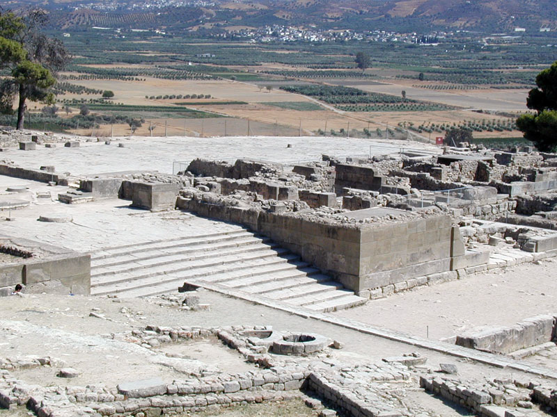 Entrée Ouest du complexe palatial de Phaistos, Crète. Photograph taken by Marsyas 13:09, 28 October 2005 (UTC)